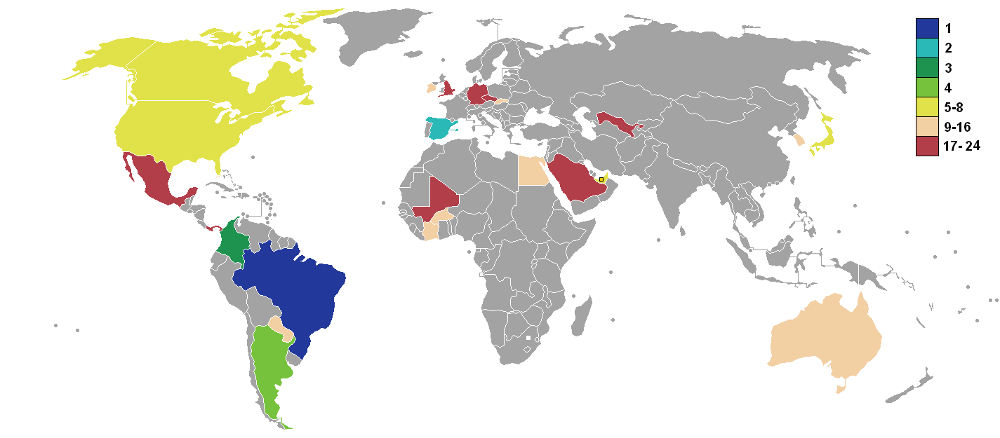 Copa disputada en Emiratos Árabes Unidos